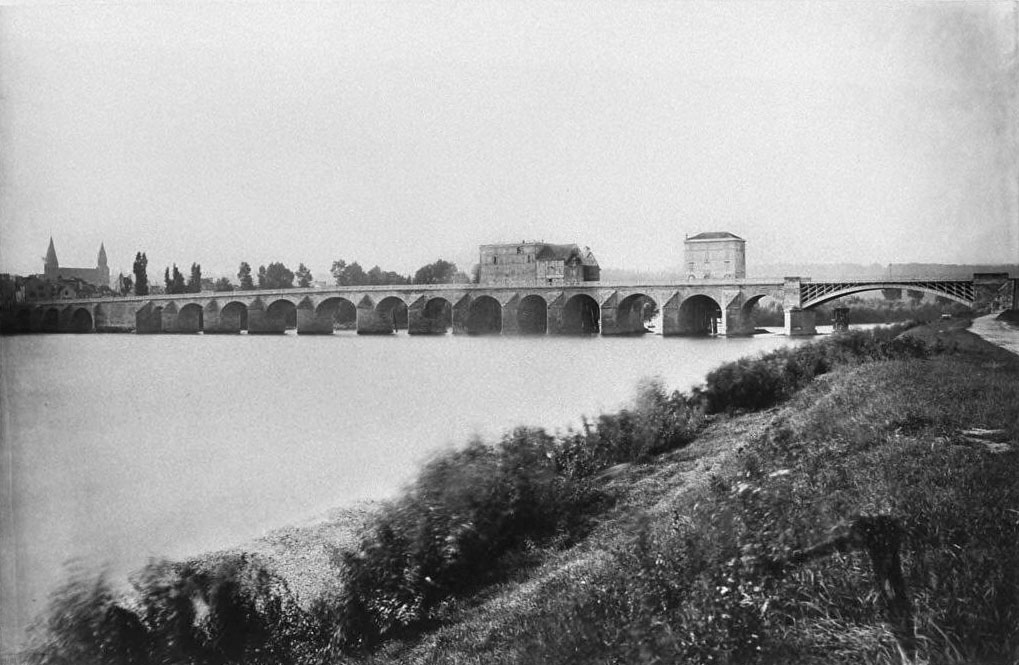 Ancien pont de Poissy sur la Seine. Vue prise d'amont - Rive droite. École nationale des ponts et chaussées.